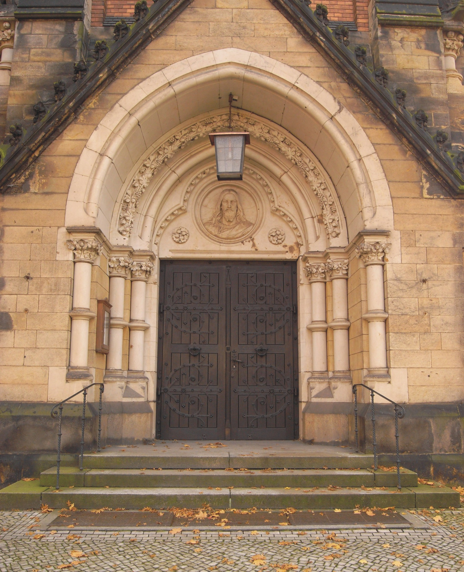 Heilig-Geist-Kirche in Dresden-Blasewitz, Portal (Sachsen, Deutschland)